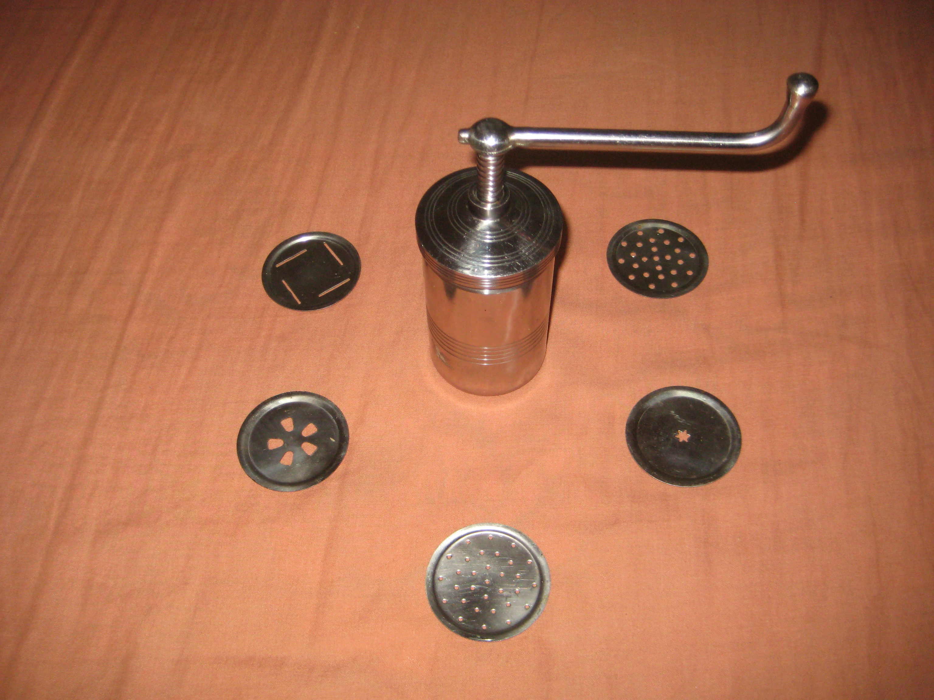 സേവനാഴി - അച്ച് എന്ന് കൂട്ടി ഇതിനെ ഇടിയപ്പം അച്ച് എന്ന് സാധാരണയായി വിളിക്കുന്നു. കേരളത്തിൽ ഉപയോഗിക്കുന്ന ഒരു ഭക്ഷണപദാർത്ഥമാണ്‌ നൂലപ്പം. ചിലയിടങ്ങളിൽ നൂൽപുട്ട് അഥവാ ഇടിയപ്പം എന്നും പറയാറുണ്ട്. അരിപൊടി (പച്ചരി പൊടിച്ചുവറുത്തത്) കുറച്ച് വെള്ളവും ഉപ്പും ചേർത്ത് നന്നായി കുഴച്ച് നൂലപ്പം അച്ചിൽ നിറച്ച് ശക്തിയായി അമർത്തുന്നു. അച്ചിനുള്ളിൽ തന്നെ താഴെ ഭാഗത്തായി വെയ്ക്കുന്ന അരിപ്പയിലെ ചെറിയ സുക്ഷിരങ്ങളിലൂടെ അരിമാവ് നൂല് പോലെ പുറത്തേക്ക് വരുന്നു. ഇങ്ങനെ പുറത്തേക്ക് വരുന്ന അരിമാവ് ആവിയിൽ വേവിച്ചാണ് നൂലപ്പം ഉണ്ടാക്കുന്നത്. ചിലസ്ഥലങ്ങളിൽ തേങ്ങാപ്പീരയും നൂലപ്പത്തിന്റെ കൂടെ ചേർക്കുന്നു. ചിത്രത്തിൽ കാണുന്ന അച്ച് ഉപയോഗിക്കുന്നത്, പിടി വട്ടം തിരിച്ചാണ്, അച്ചിൽ നിറച്ചിരിക്കുന്ന അരിമാവ് അരിപ്പയിലൂടെ നൂൽ ആകൃതിയിലാക്കുന്നത്. ഇതിനായി വളരെ ചെറിയ സുഷിരങ്ങളുള്ള അരിപ്പയാണ് ഉപയോഗിക്കുന്നത്. ഇതേ അച്ച് ഉപയോഗിച്ച് പക്കുവട പോലെയുള്ള മറ്റു പലഹാരങ്ങളും ഉണ്ടാക്കാവുന്നതാണ്. അതിനായി അച്ചിന്റെ വലതുവശത്തുള്ള ആദ്യത്തെ അരിപ്പയാണ് (നാല് വിടവുള്ള അരിപ്പ) ഉപയോഗിക്കുന്നത്. പ്രാതൽ വിഭവമായിട്ടാണിത് കേരളത്തിൽ ഇത് കൂടുതൽ ഉപയോഗിച്ചിരുന്നതെങ്ങിലും ഇപ്പോൾ ഏത് സമയത്തും കഴിക്കുന്ന ഒരു ഭക്ഷണമായി മാറിയിട്ടുണ്ട്. എരിവോ മധുരമോ ഉള്ള കറികളുമായി ചേർത്താണ് സാധാരണയായി ഇടിയപ്പം തിന്നുക. ശ്രീലങ്കയിലെയും ഒരു പ്രധാന പ്രാതൽ-അത്താഴ ഭക്ഷണമാണ് ഇടിയപ്പം. പല ധാന്യങ്ങളും ശ്രീലങ്കക്കാർ ഇടിയപ്പത്തിൽ ചേർക്കുന്നു. കുറിപ്പ് - നൂലപ്പം ആവി കയറ്റി വേവിക്കുന്ന പാത്രത്തിന് സാധാരണയായി ഇഡലി ചെമ്പ് എന്നാണ് പറയുന്നത്.